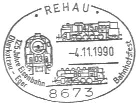 125 JahreBahnstrecke Oberkotzau - Eger